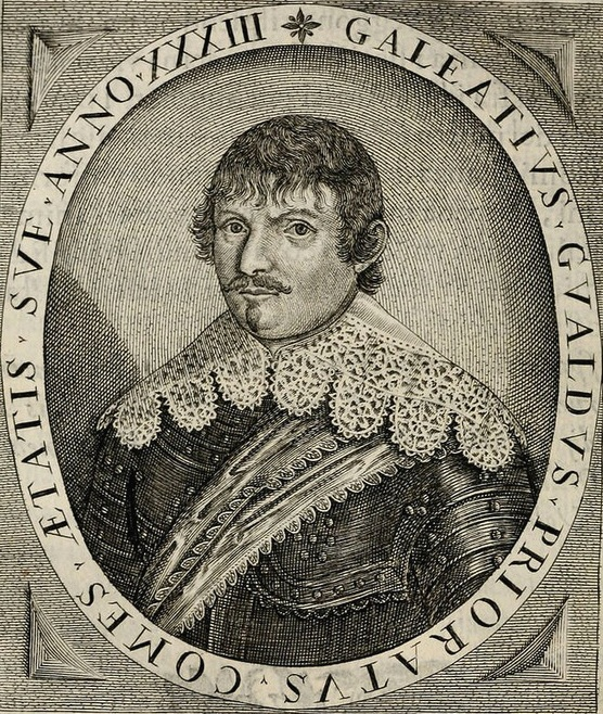 Galeazzo Gualdo (* 23. Juli 1608 in Vicenza; † 1678 in Vicenza; eigentlich Galeazzo Conte Gualdo Priorato) war ein italienischer Söldner, Historiker, Geograph und Diplomat.